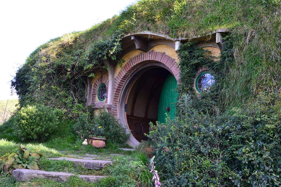 Maison de Bilbo Sacquet telle que représentée dans les films de Peter Jackson adaptés de l'œuvre de Tolkien, en 2013.